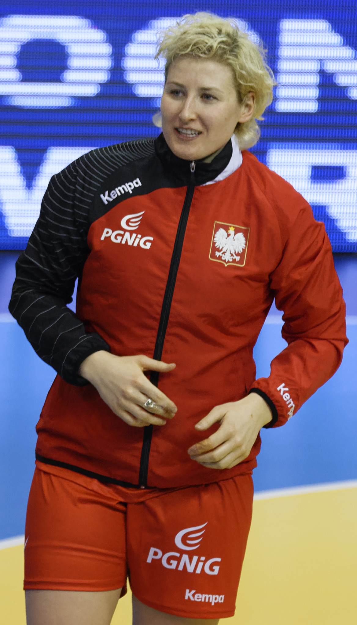 Rencontre en la Pologne et la norvège lors de la golden League de handball. A Dijon, le 19 mars 2015.